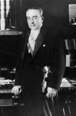 Juan Esteban Montero, Presidente de la República, 1932